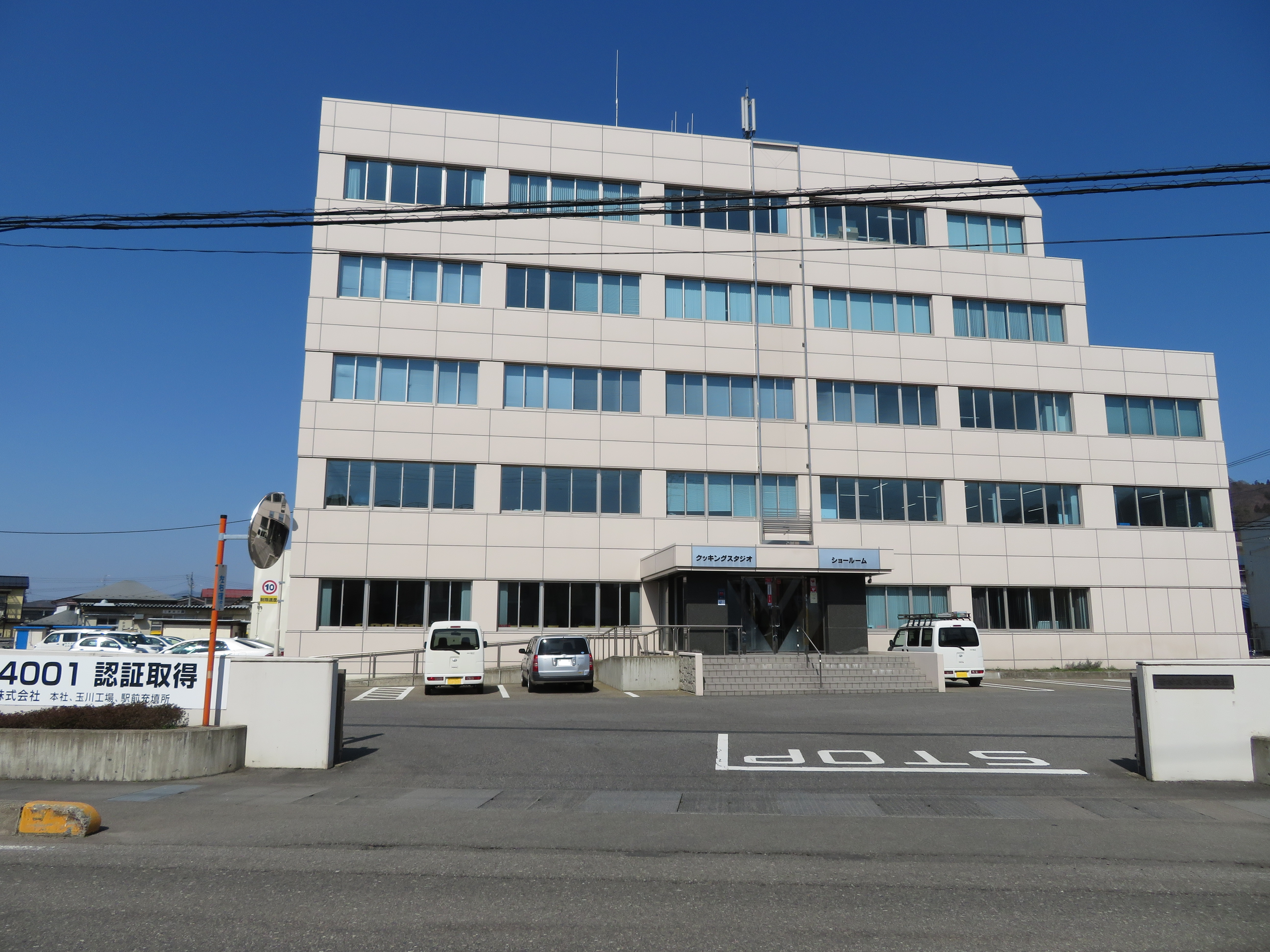 会津若松市に所在する若松ガス本社